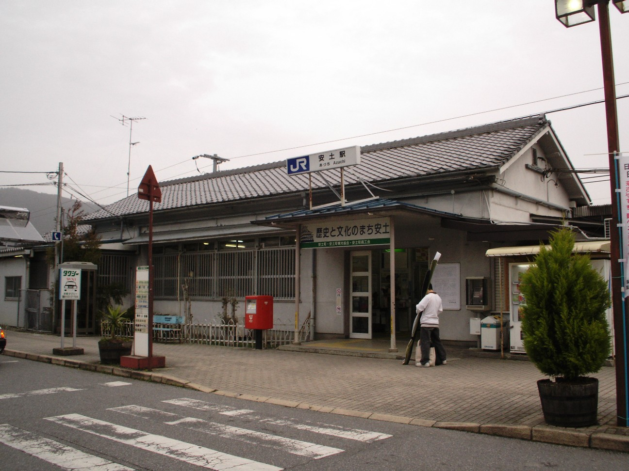 投稿者が撮影2007年04月01日